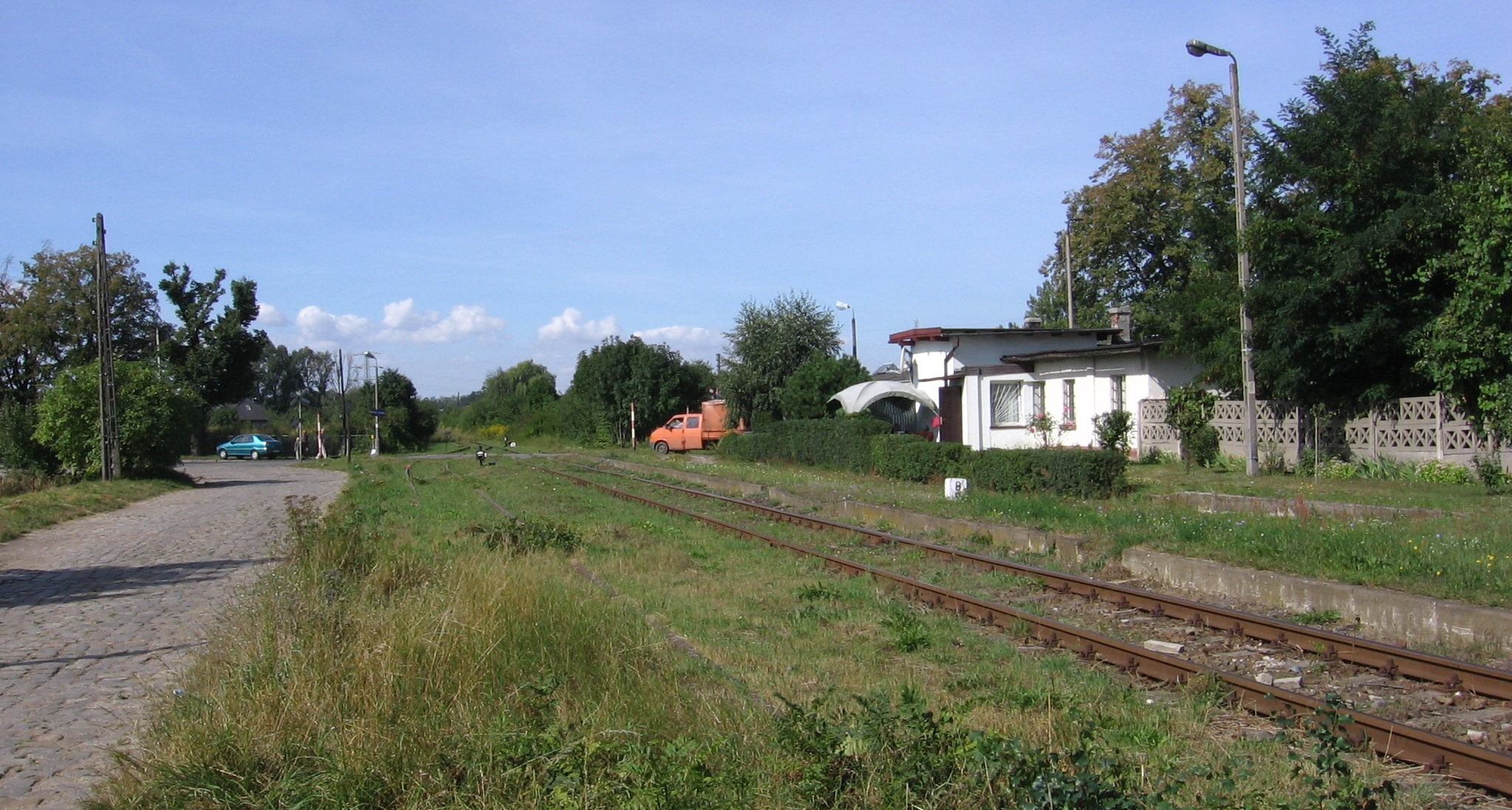 Miejsce, w którym znajdowała się stacja kolejowa Wrocław-Partynice. Widoczny dawny budynek stacyjny, krawędzie peronów stacji, dwa tory (jeden całkowicie zarośnięty chwastami) i słupek kilometrowy "8,5". Prawdopodobnie był jeszcze trzeci tor przebiegający równolegle z prawej strony głónej osi torów, ale został zlikwidowany. W głębi tory przecina ulica Ołtaszyńska (w chwili wykonania zdjęcia jechały nią dwa widoczne na zdjęciu samochody), wzdłuż torów po lewej widoczny brukowany dojazd do dawnej rampy towarowej.